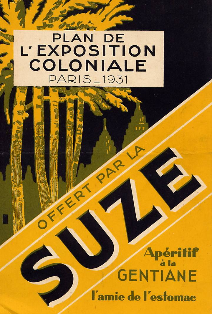 Plan publicitaire de l'Exposition Coloniale de Paris en 1931